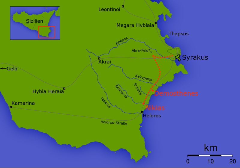 Bei der Erstellung der Landkarte wurden die Generic Mapping Tools verwendet: Für das Relief - falls vorhanden - wurde(n) einer oder mehrere dieser externen Public Domain-Datensätze verwendet: ETOPO2 (Auflösung 2′ = 3,6km am Äquator) GLOBE (30″ = 0,9km) SRTM (Shuttle Radar Topography Mission) (3″ = 90m) Wichtiger Hinweis: Vor dem Verschieben von Landkarten mit deutscher Beschriftung nach Commons bitte folgenden Hinweis beachten: Maps and diagrams can be uploaded in any language, but a "blank" version of such files (without any comments, but rather numbers or letters) is preferred. [...] you may of course upload both a commented and an uncommented version, other users will use the uncommented version to translate it into their own language. Also vor dem Verschieben der deutschen Version bitte an den Autor der Karte wenden mit der Bitte um eine unbeschriftete Version!